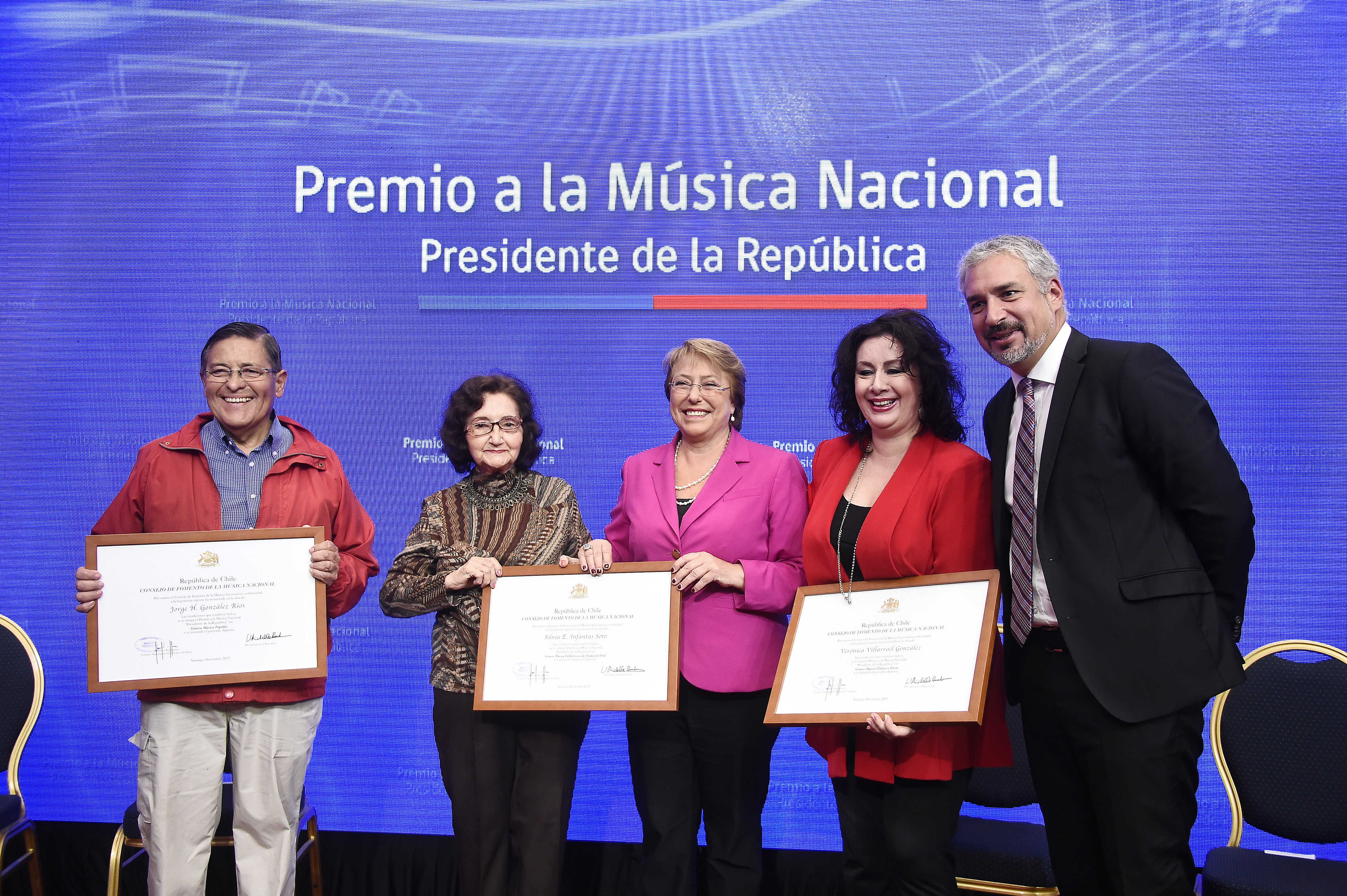 Gobierno de Chile